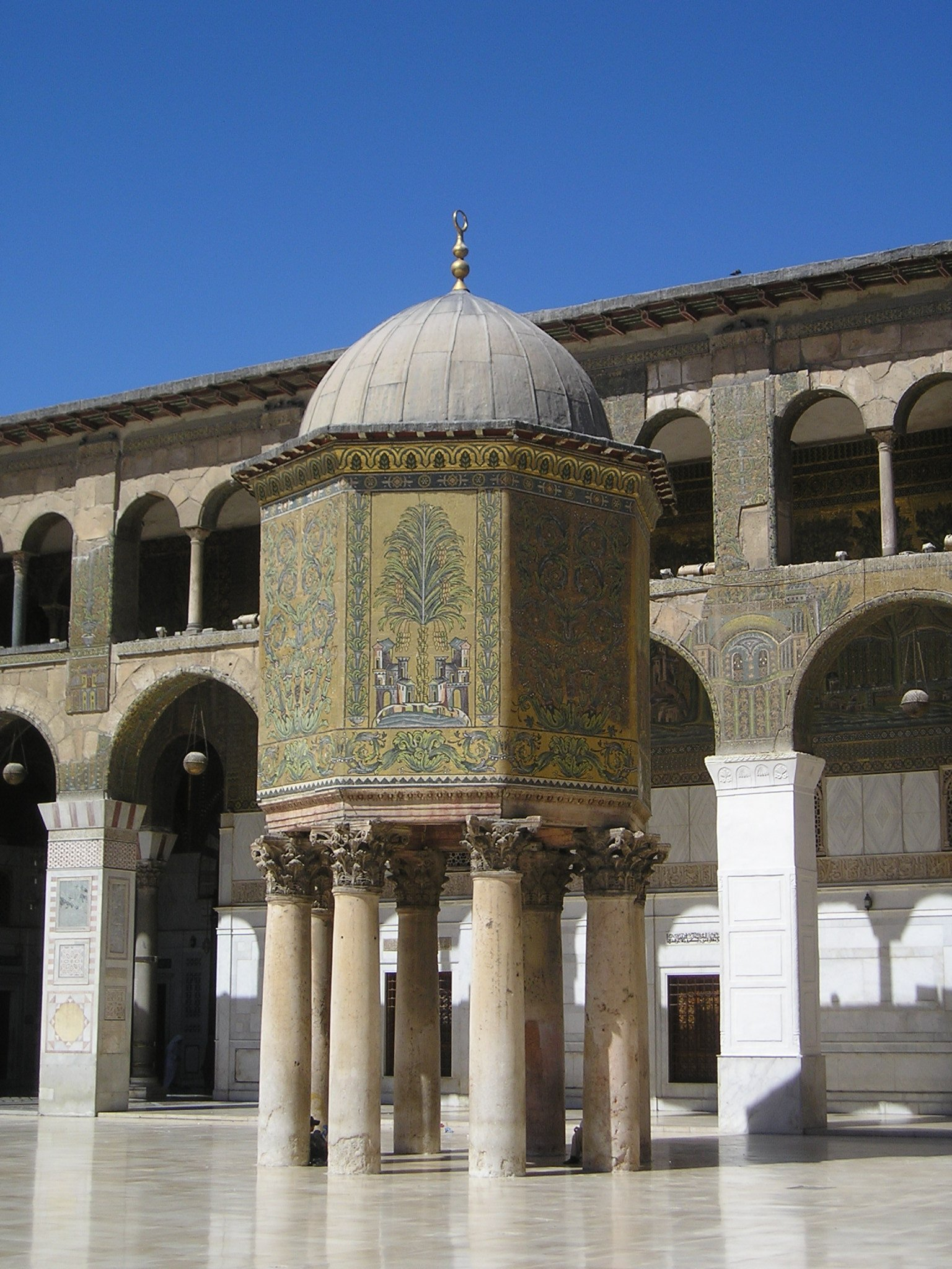 Damasco: Mezquita omeya en: Damascus, Syria - Umayyad Mosque: mosaic covered Dome of the Treasury. sl: Damask, Sirija - mošeja Omajadov: z mozaiki prekrita kupola zakladnice. I took the photo myself.